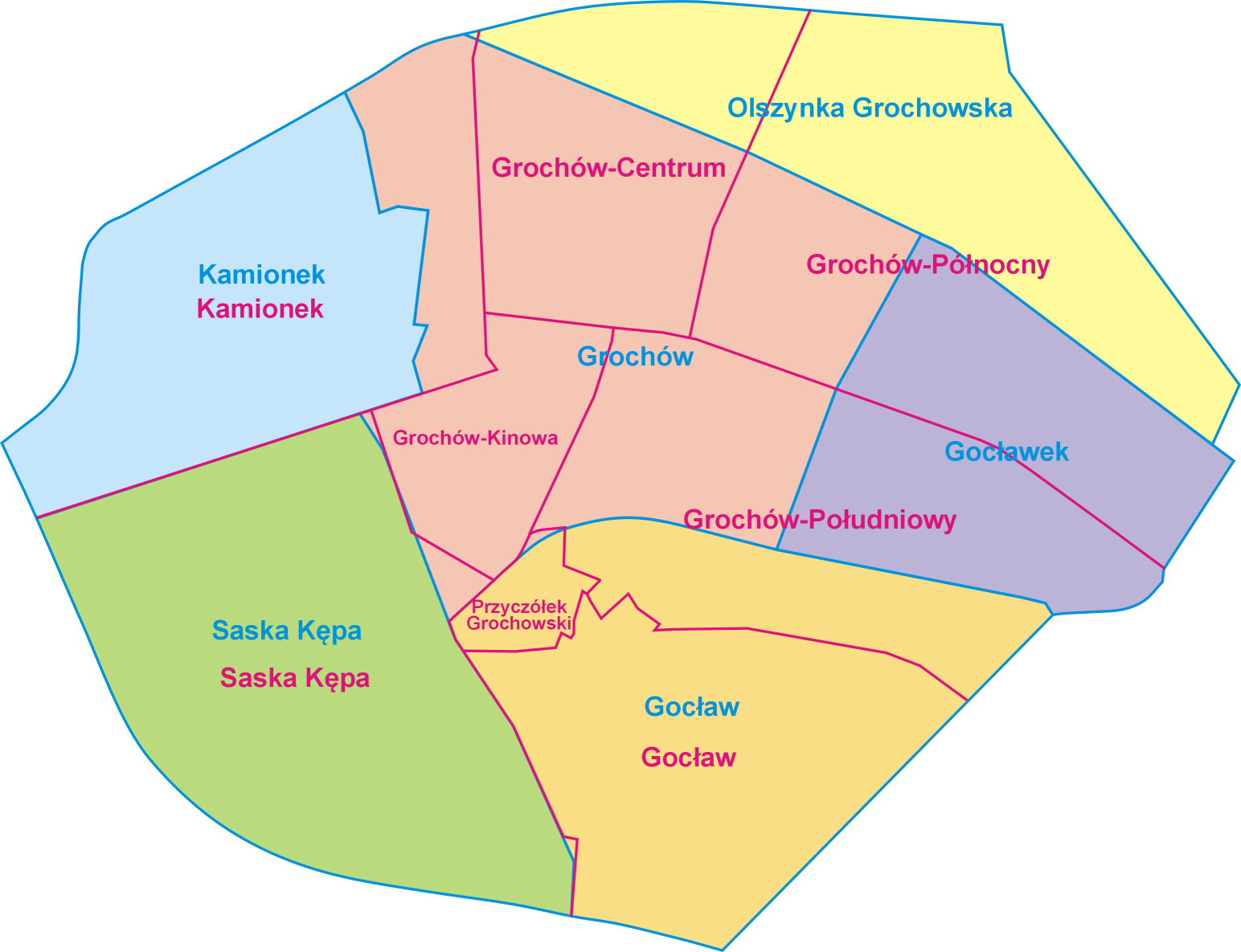 Mapa Pragi Południe z podziałem na obszary Miejskiego Systemu Informacji (niebiskie granice i opisy, kolorowe wypełnienie jednostek) oraz z zaznaczonymi granicami osiedli (jednostki pomocnicze niższego rzędu) zgodnie z Uchwałą Nr 328/LI/2010 Rady Dzielnicy Praga Południe m. st. Warszawy z dnia 19 kwietnia 2010 r. (purpurowe granice i opisy)